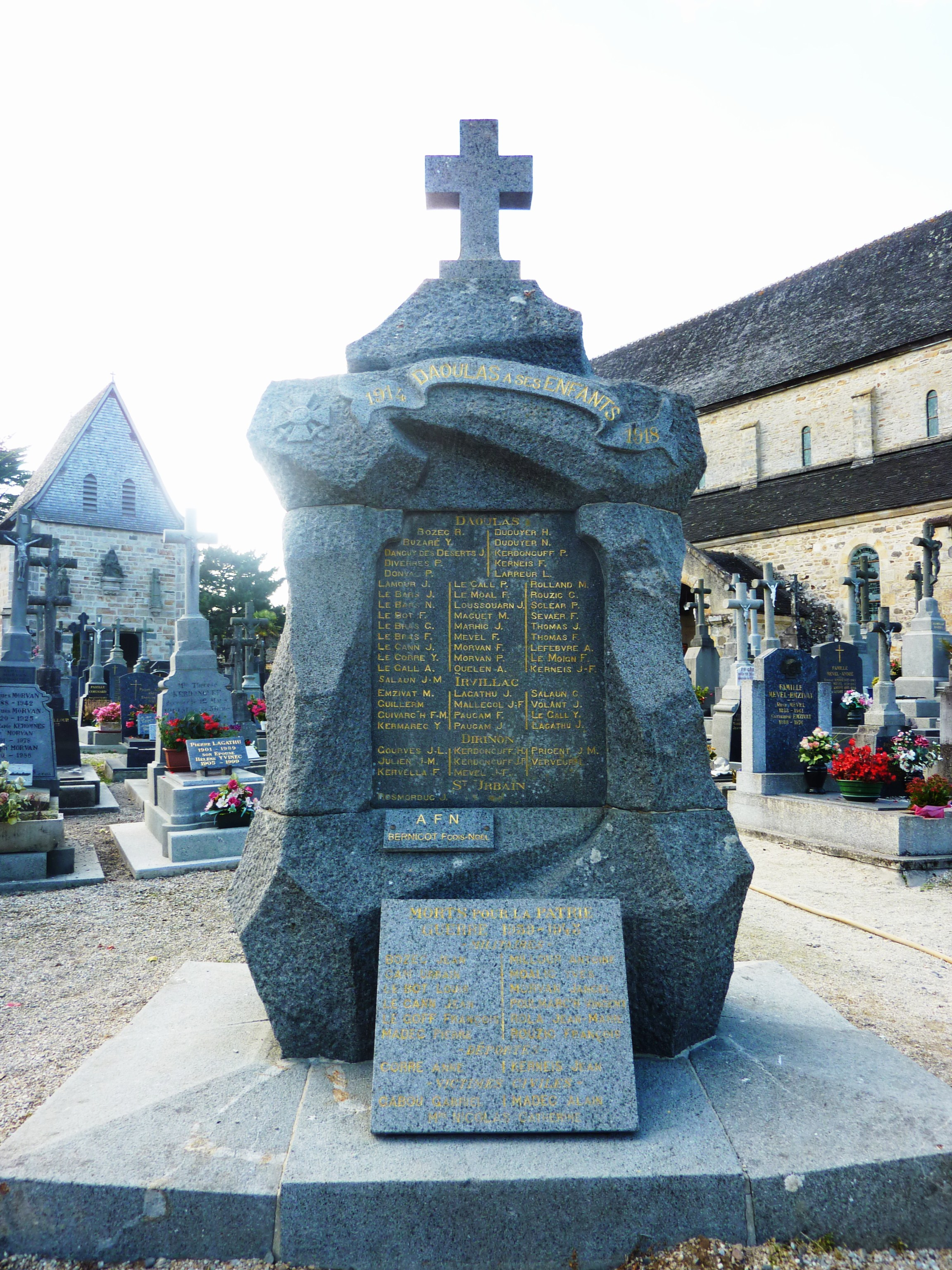 Daoulas : le monument aux morts